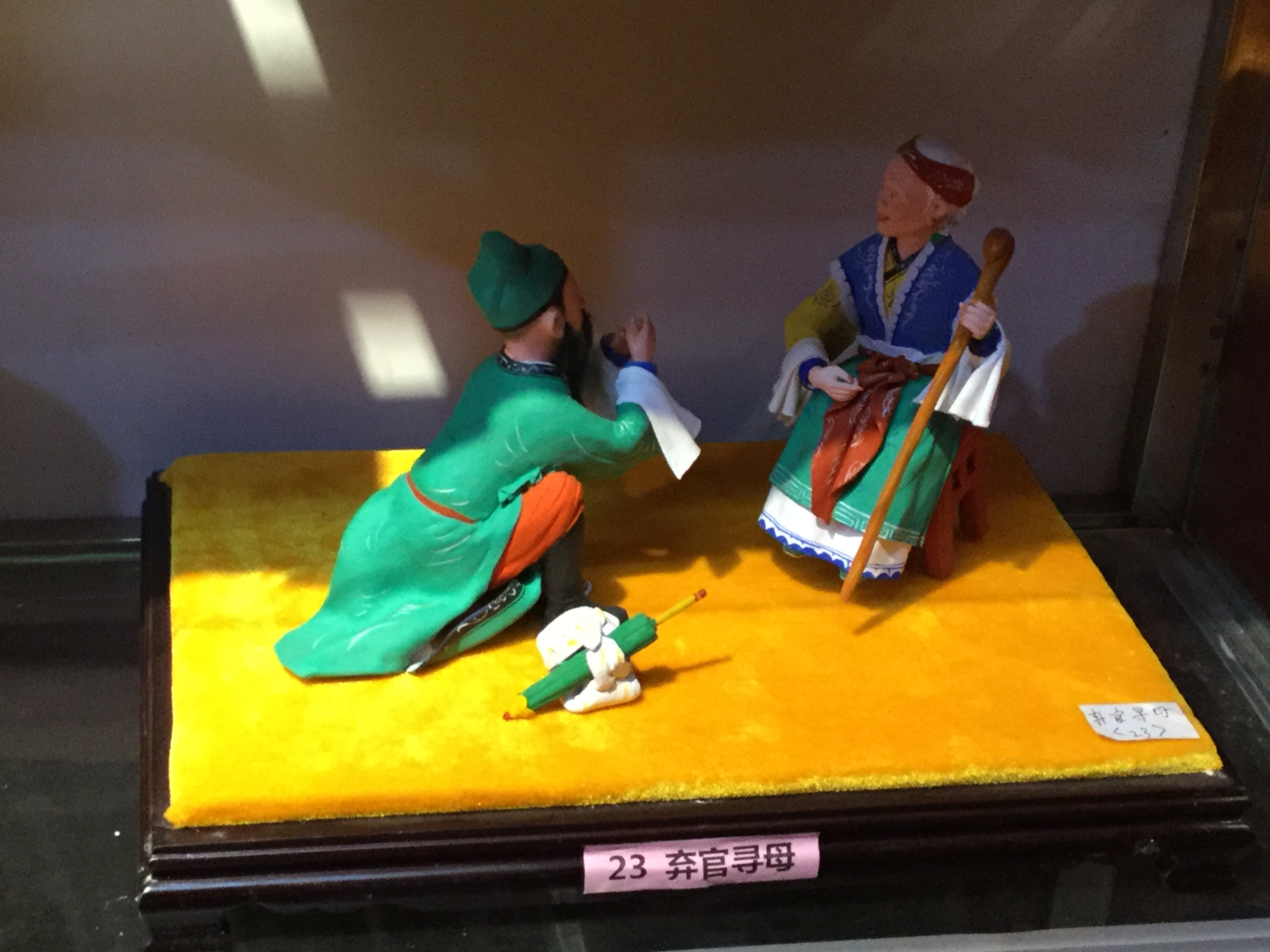 翁仔灯《弃官寻母》，摄于2018年3月2日。